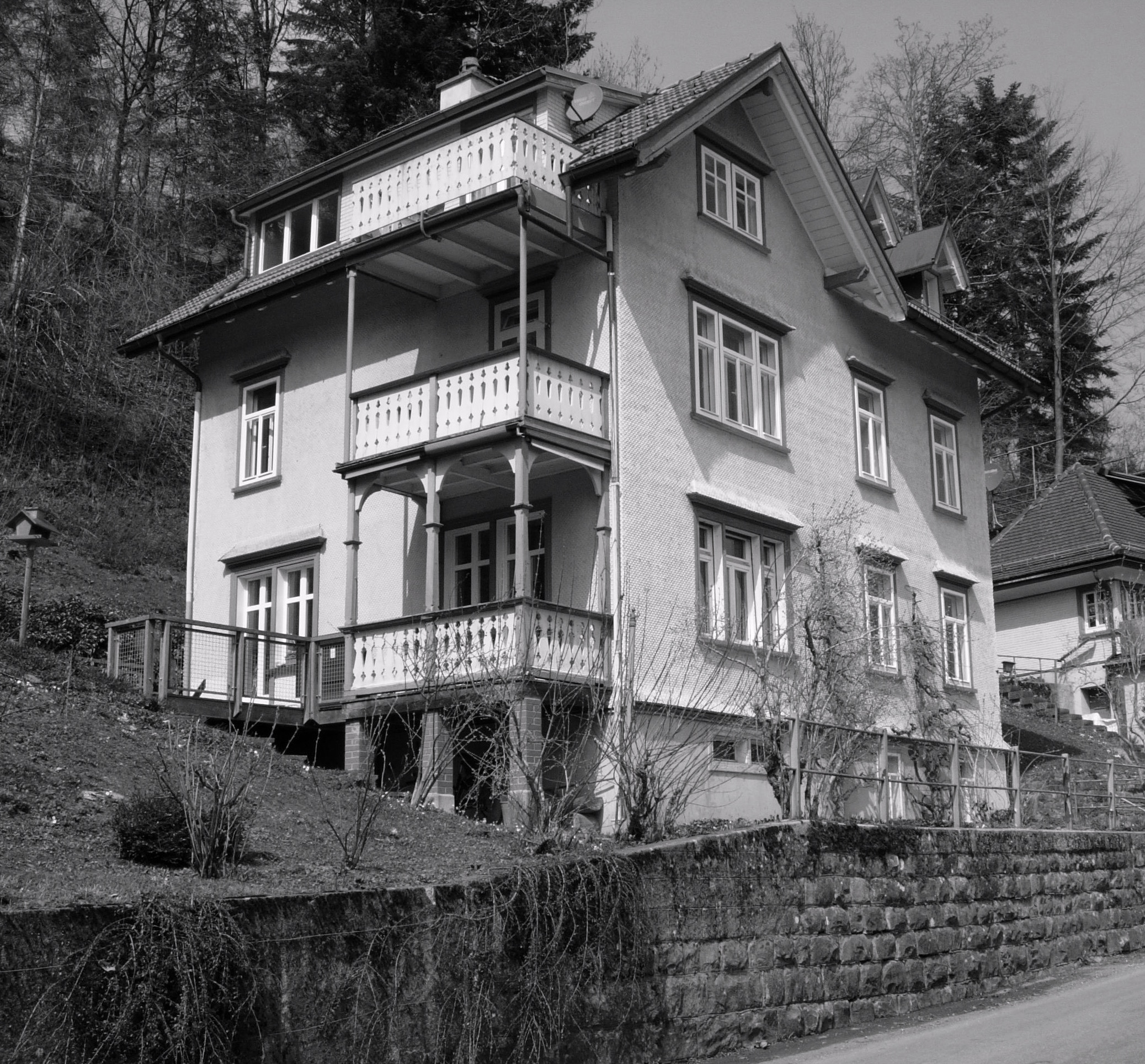 Elisabeth Pletschers Geburts- und späteres Wohnhaus: Vordorf 48a in Trogen. Heute lautet die Adresse Altstätterstrasse 8, da die Gemeinde von Flurbezeichnungen und Versicherungsnummern auf normale Strassennamen wechselte